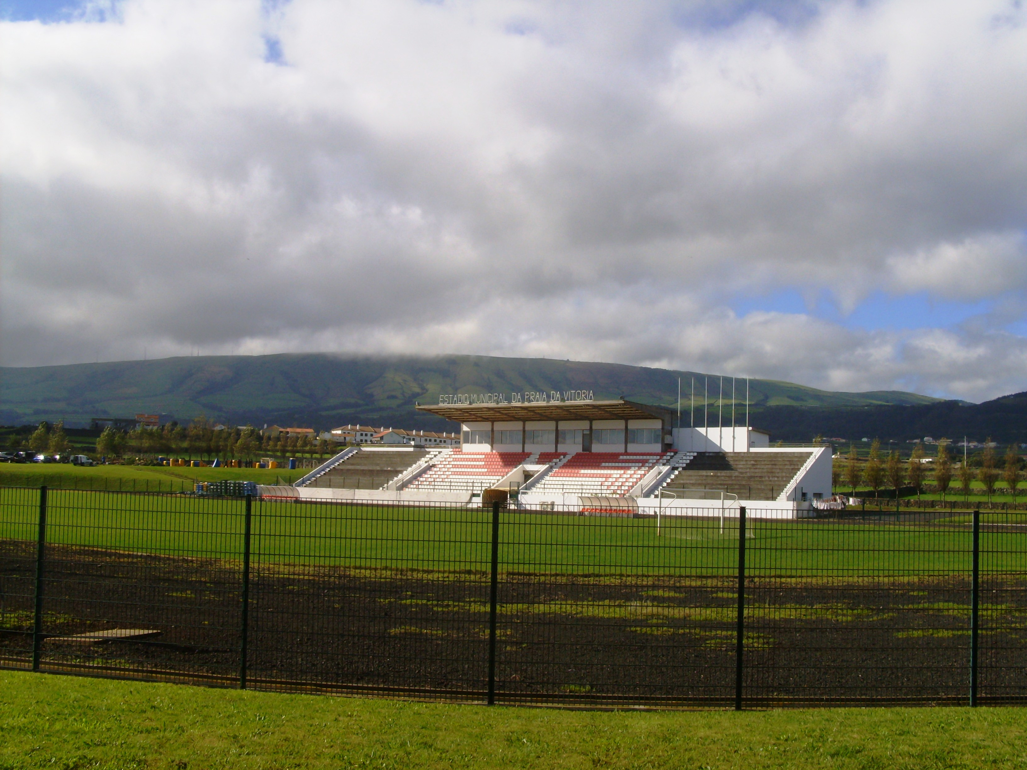 Estádio Municipal, Praia da Vitória, Ilha Terceira, Açores.